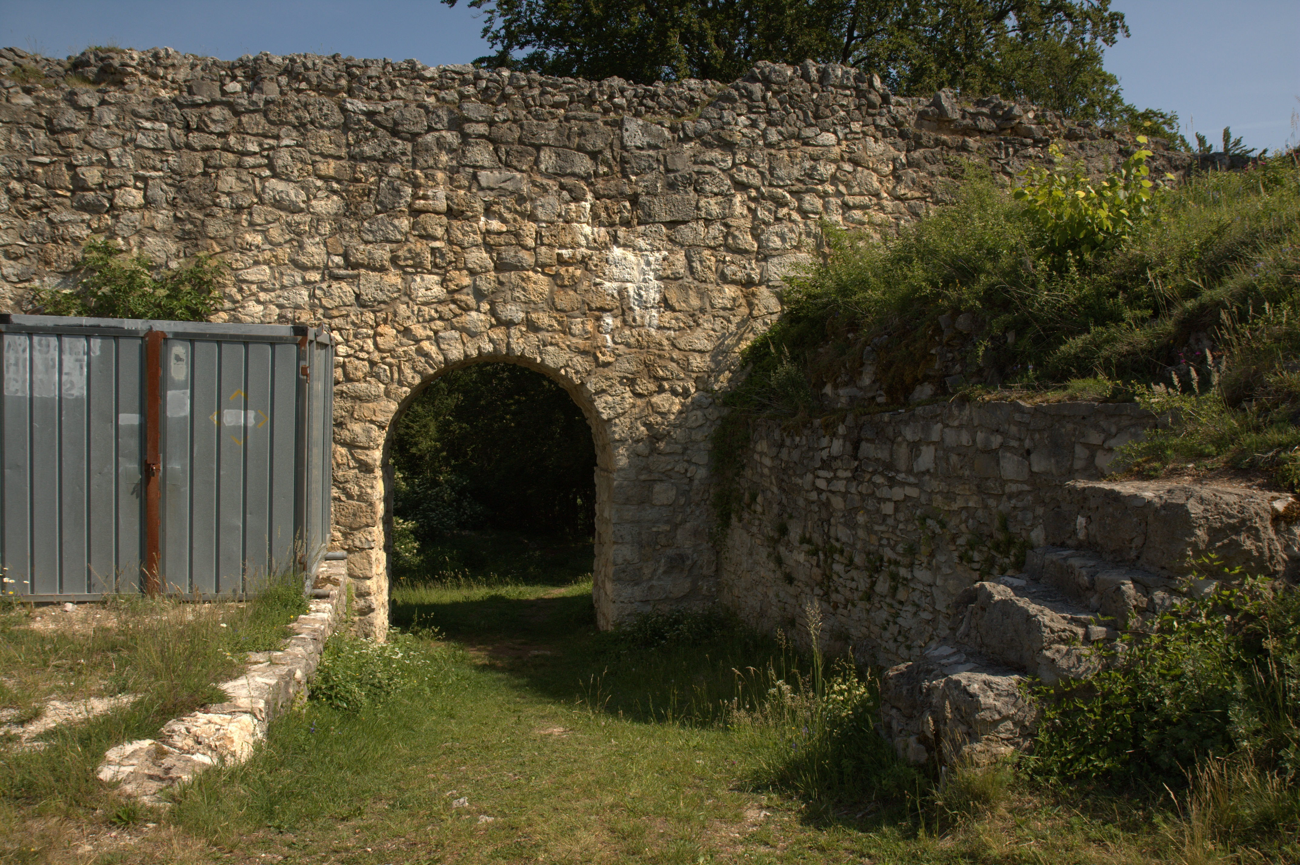 Burgruine Velburg - Innenansicht des Burgtores